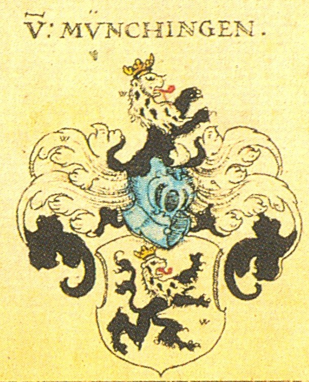 Ritterschaft und Adel in Schwaben von Münchingen